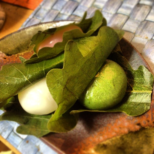 中文（香港）: 日本端午節的柏餅